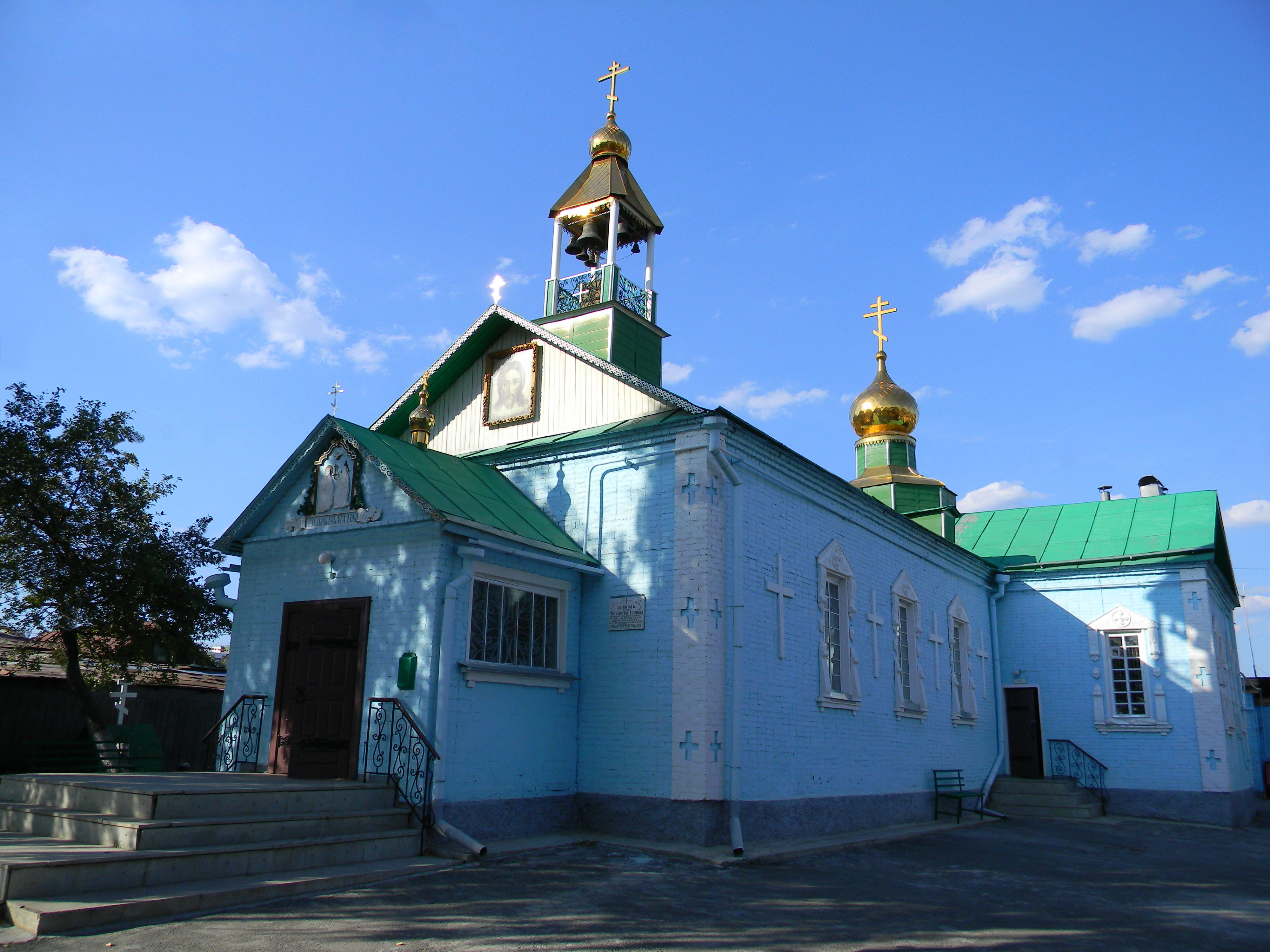 Свято-Троицкий Храм г.Белорецка